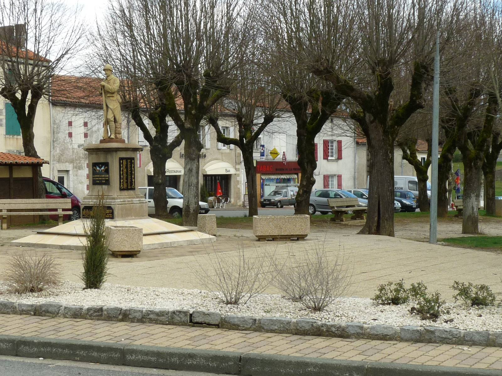 place du marché, St-Claud, Charente, France